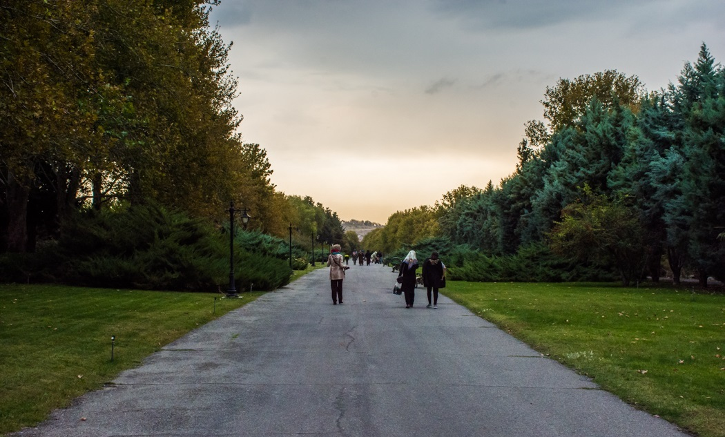 باغ گیاه‌شناسی ملی ایران